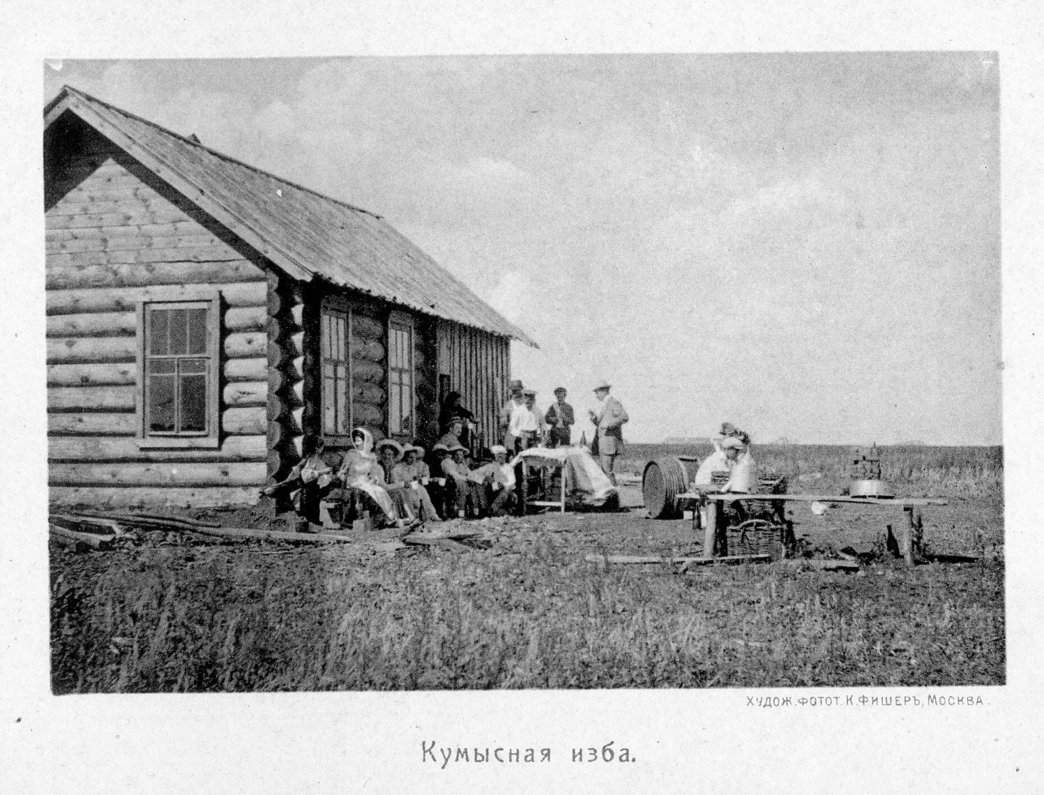 Кумысная изба при санатории "Лесное", Ставрополь (ныне Тольятти)